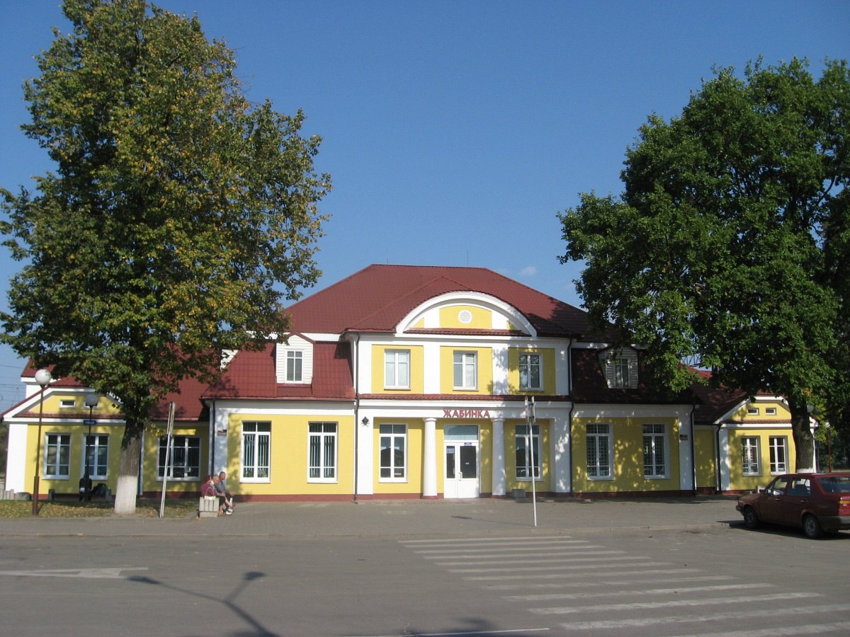 Жабінка. Вакзал